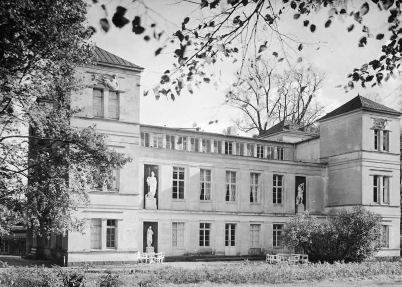 Berlin, Schloß Tegel, Parkseite. Marmorkopien antiker Statuen sind erhalten, ebenso die Reliefs der "Winde" (an den vier Türmen). 1931